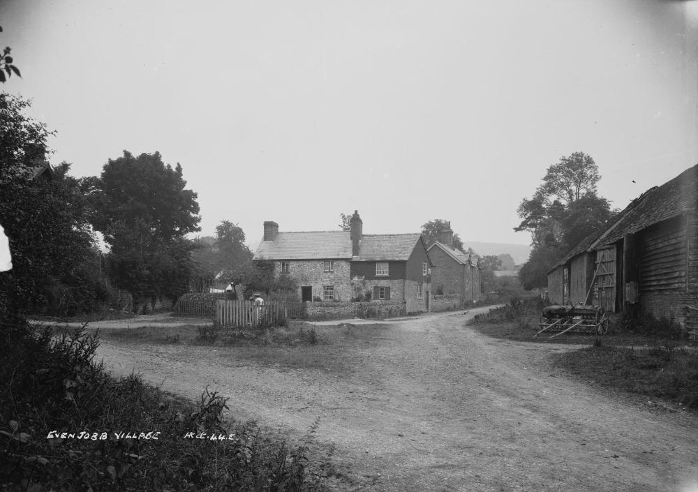 Abstract: Evenjobb village